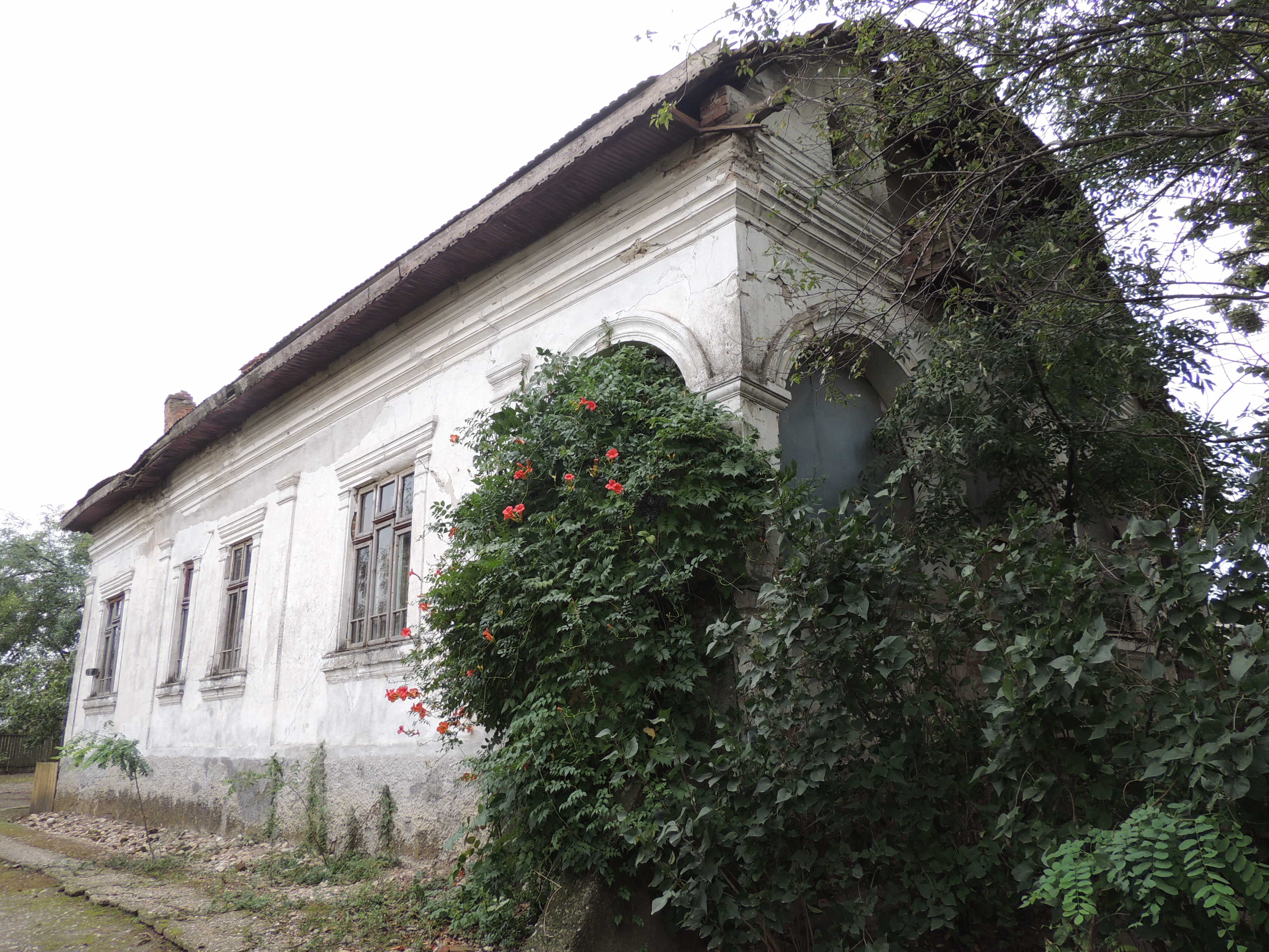 Vedere Nord-Est